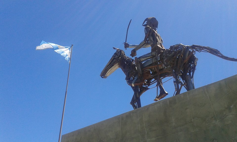 Monumento de la plaza principal de Suardi (Santa Fe)